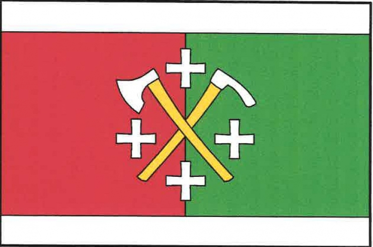 vlajka, Velká Lhota, okres Vsetín